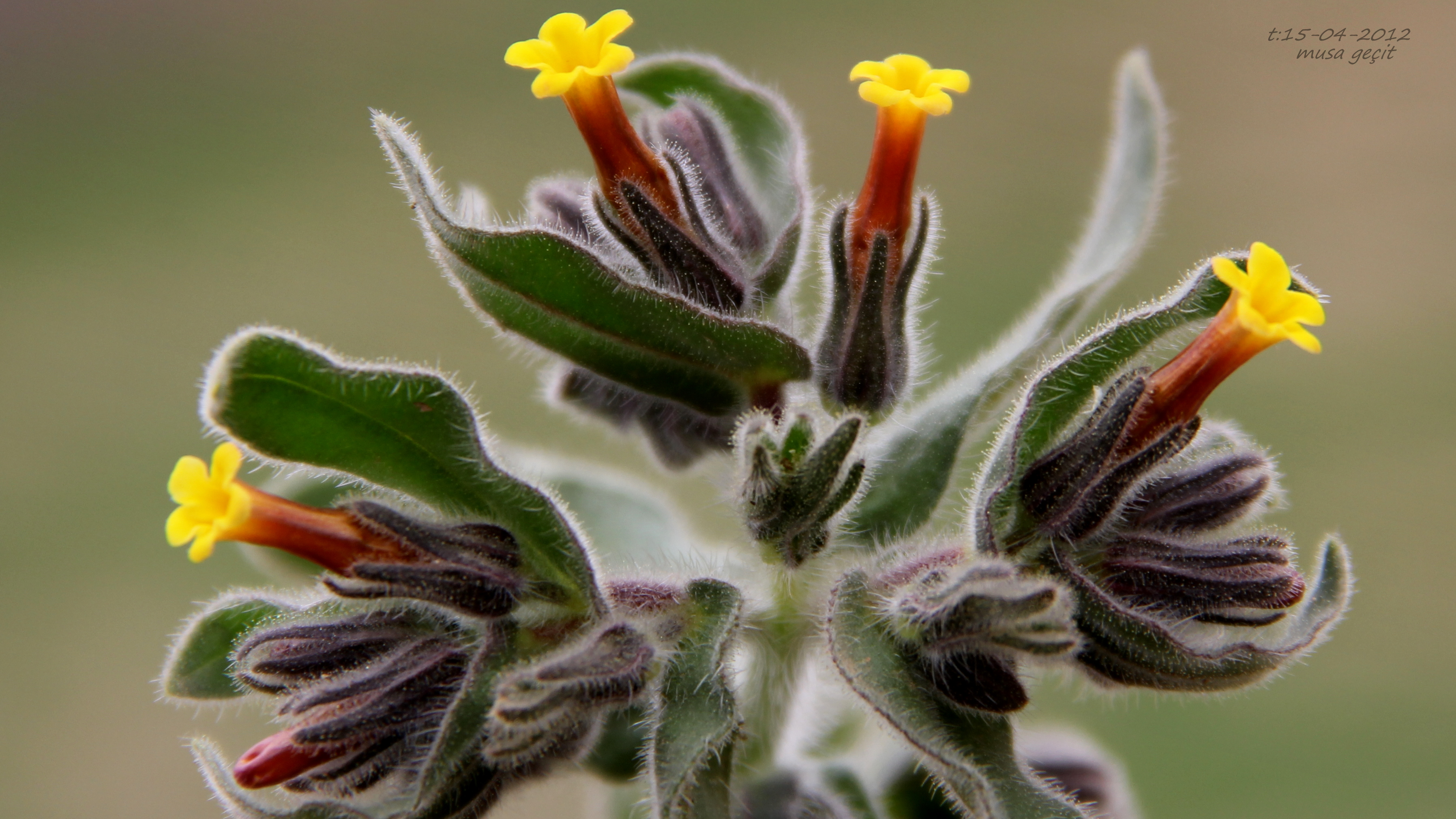 Alkanna trichophila var. mardinensis